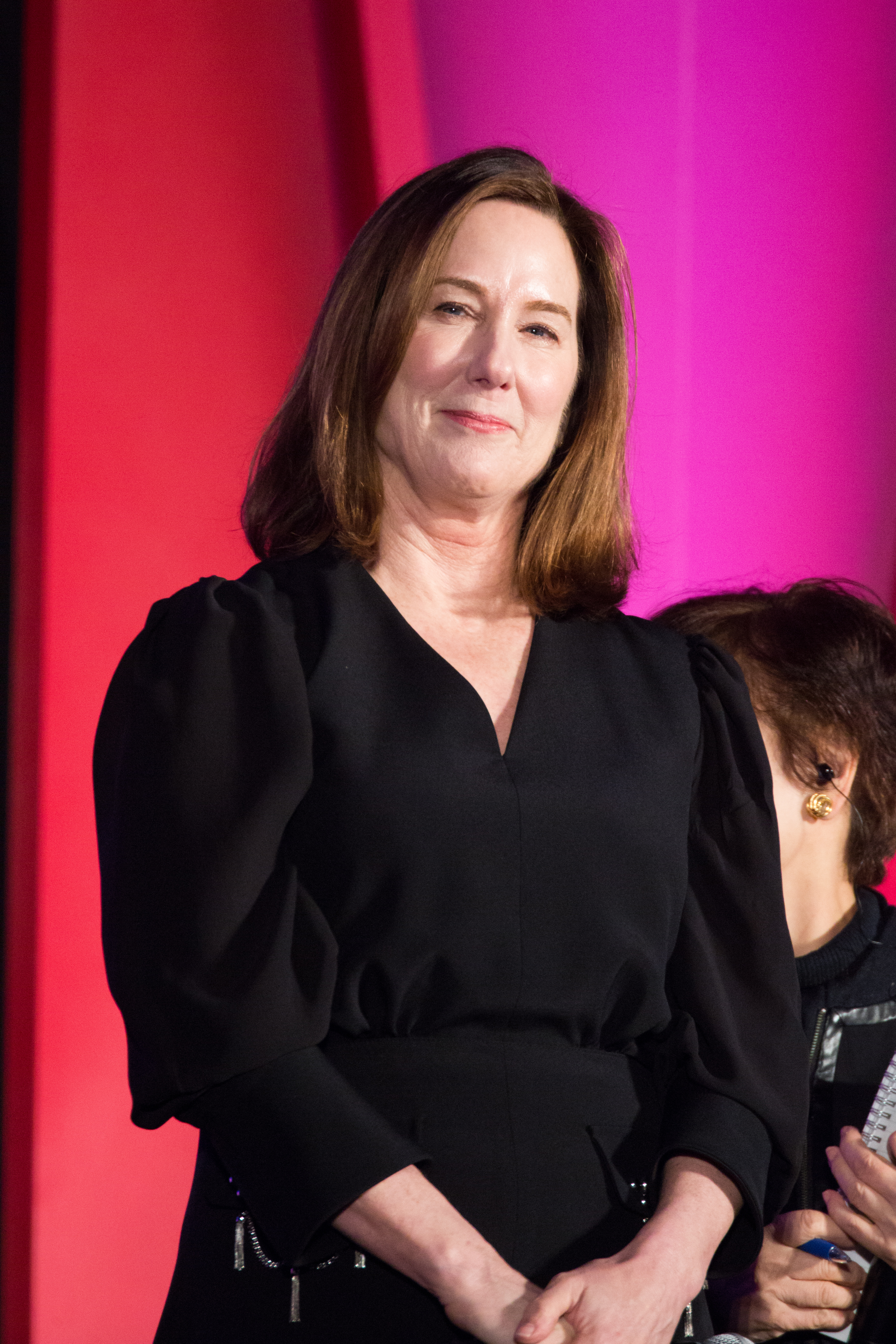 スター・ウォーズ/最後のジェダイ ジャパン・プレミア レッドカーペット キャスリーン・ケネディ